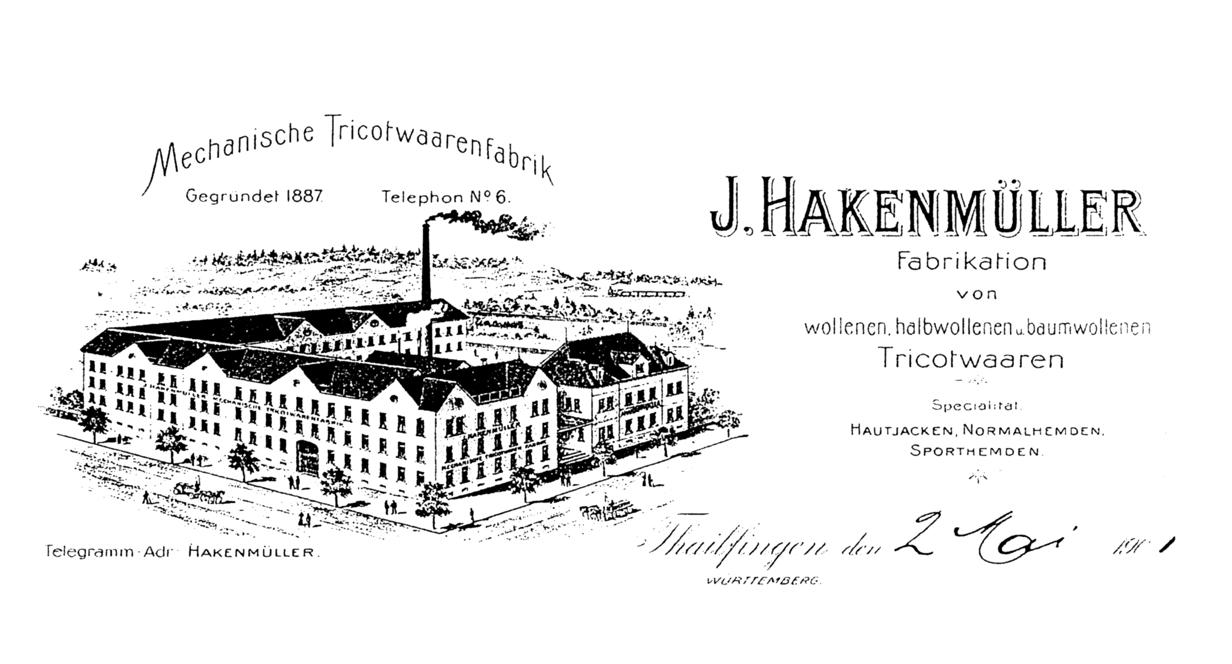 Neben der Urzelle des Unternehmens, einem Wohn- und Bauernhaus des Firmengründers Johannes Hakenmüller an der Goethe-Straße in Albstadt-Tailfingen, sind bereits die um 1900 im ´Heimatstil` erbauten Fabrikationsgebäude um die Ecke entlang der Langen Straße zu erkennen. Im Hintergrund erkennt man die 1901 eröffnete Talgangbahn, deren Mitbegründer J. Hakenmüller war.